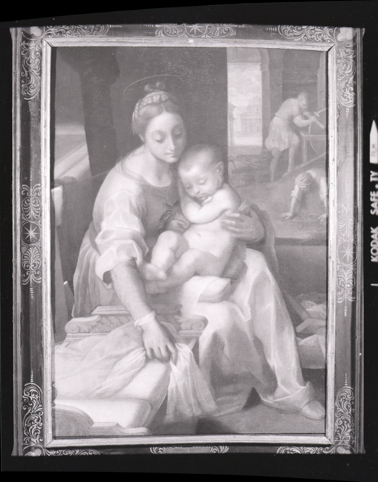 Bologna. Opere di Federico Barocci: Madonna del conte Castelbarco Albani. Servizio fotografico : Bologna, 1973 / Paolo Monti. - Buste: 3, Fototipi: 5 : Negativo b/n, gelatina bromuro d'argento/ pellicola ; 6x6. - ((Serie costituita da 5 negativi identificati con i nn.: 17773-17774. La suddetta serie è contenuta nella scatola identificata con la numerazione G17501-18000. - Occasione: Documentazione per la mostra a cura di Andrea Emiliani sull'opera di Federico Barocci tenutasi a Bologna nel 1975. - Fonte: Agenda di Paolo Monti: 4/ 30 marzo 1971/ / dal N° 16824 al N° 17956 (1971-1976), presso Archivio Paolo Monti